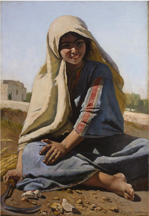 Jeune fille de Bethlehem